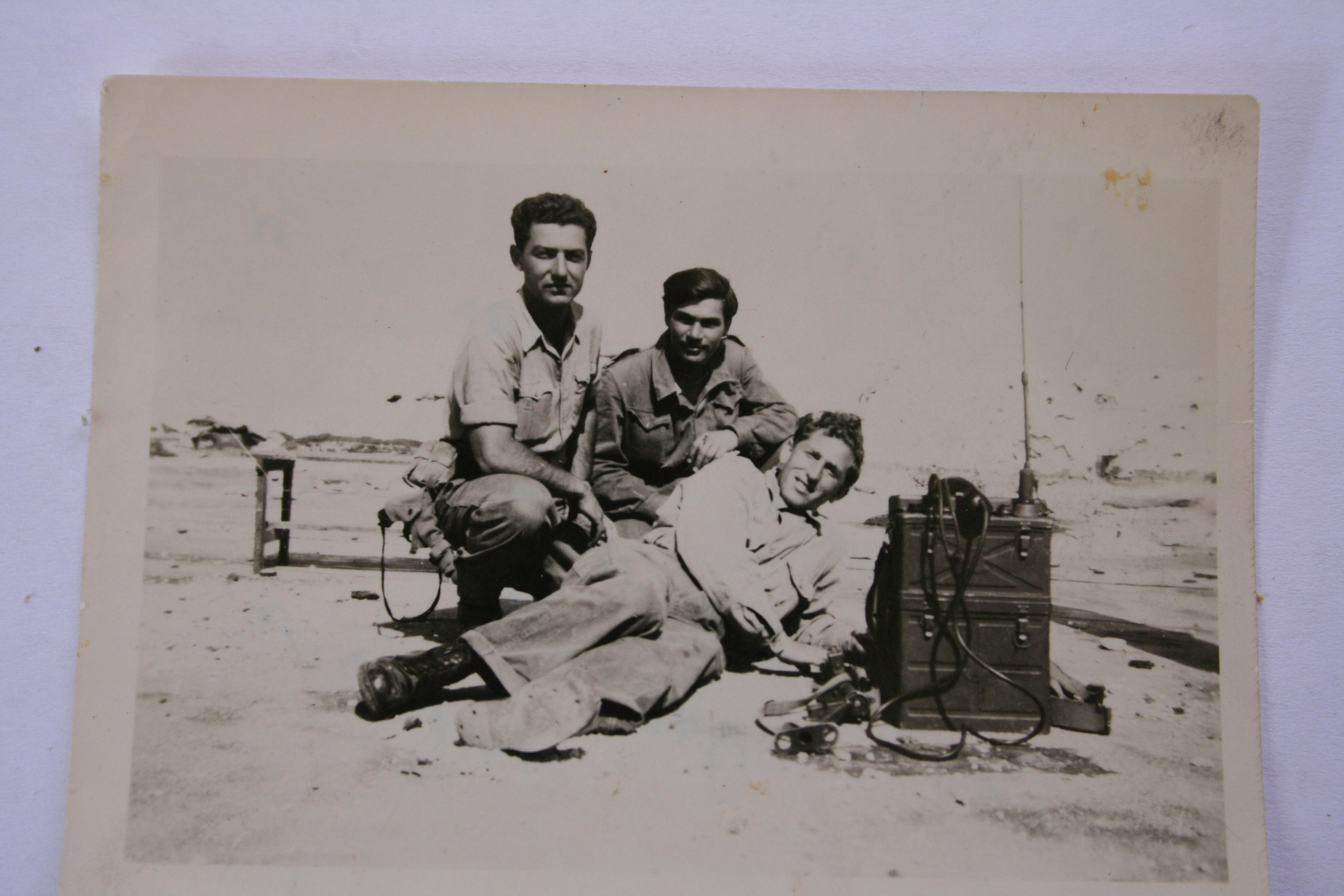 עם מכשיר הקשר על גג חדר האוכל בקיבוץ רמת רחל